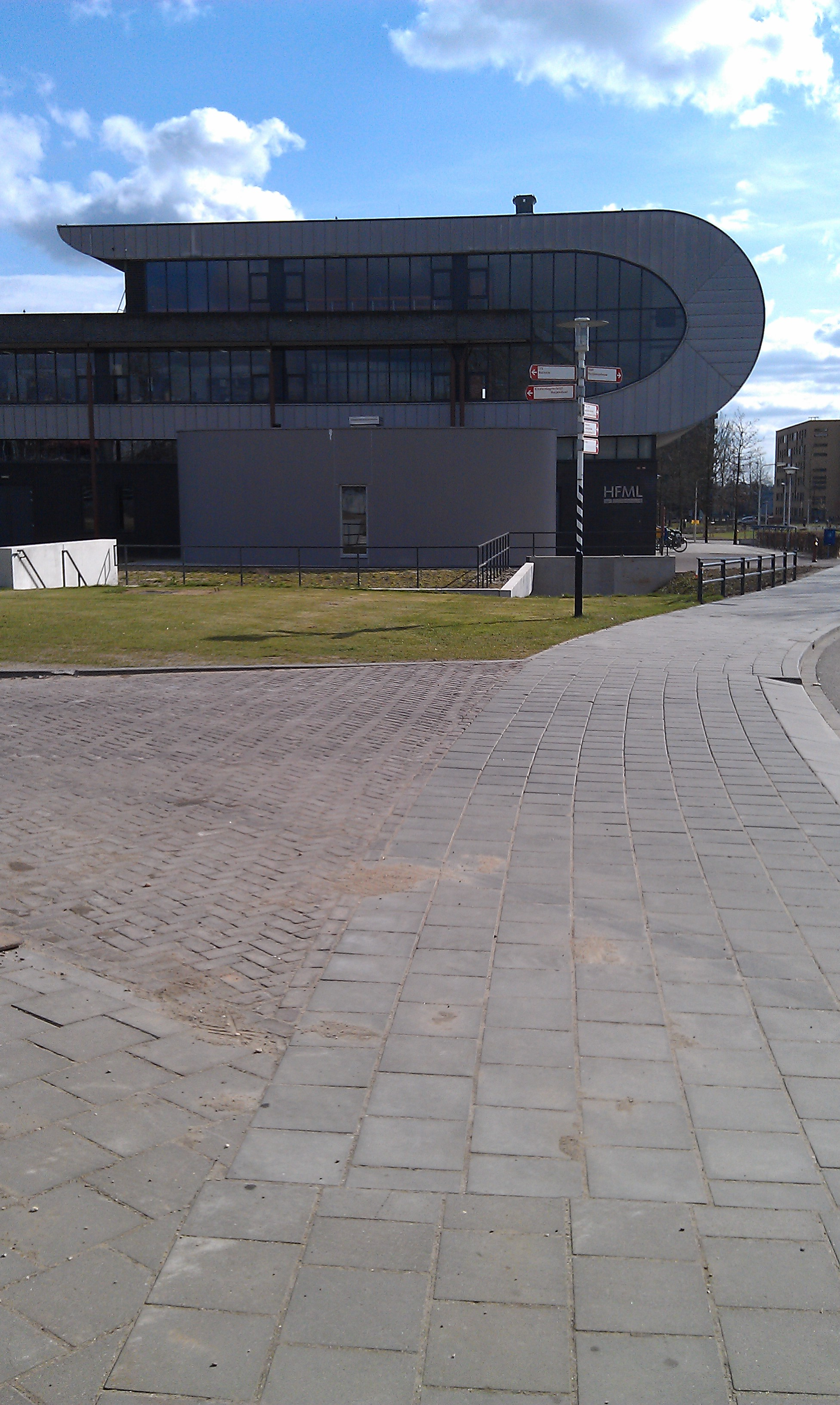 Magnetenlab van de Radboud Universiteit in Nijmegen